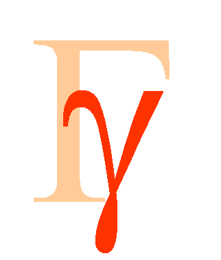 Greek letter